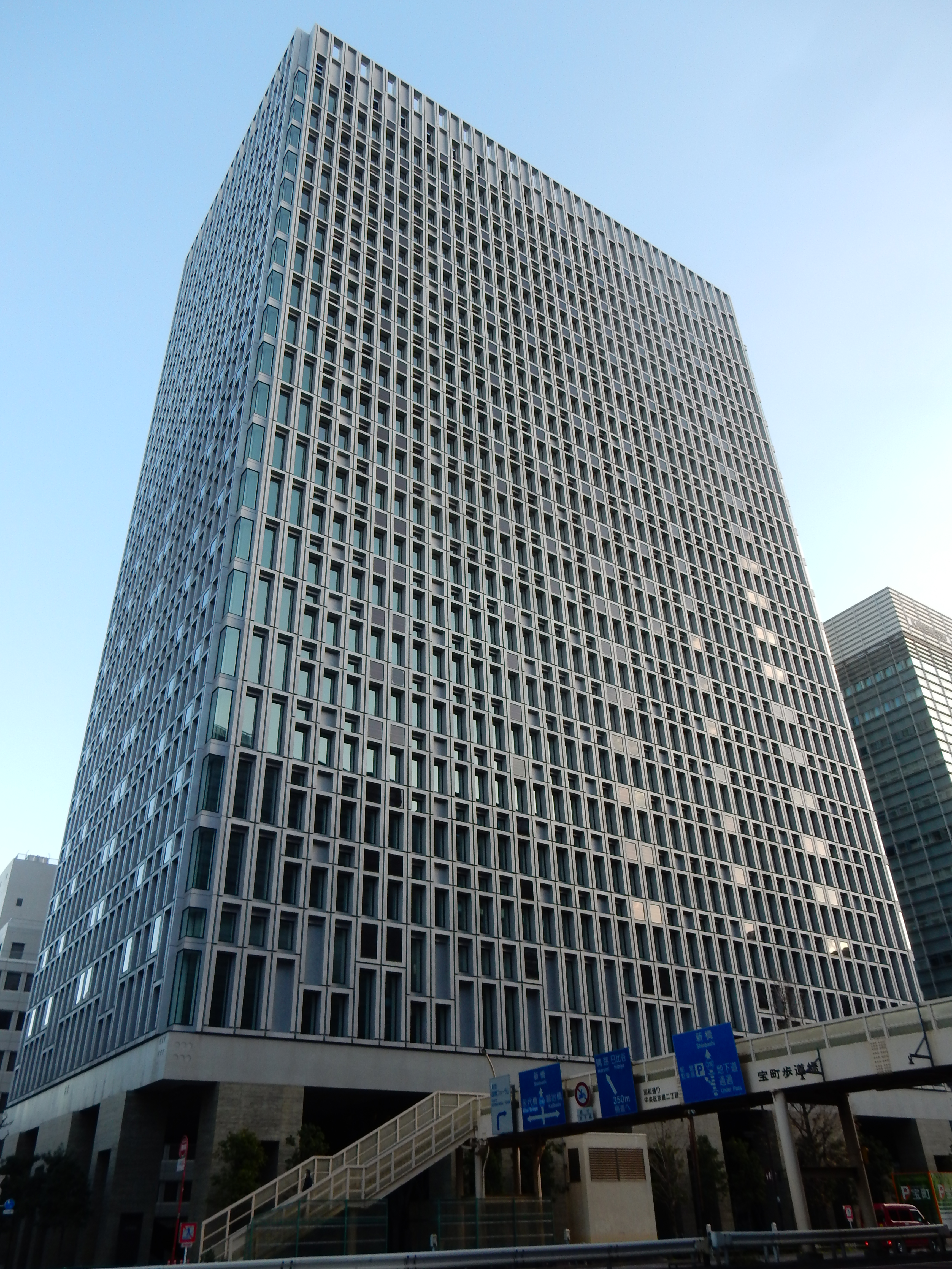 清水建設本社。東京都中央区京橋二丁目16番1号